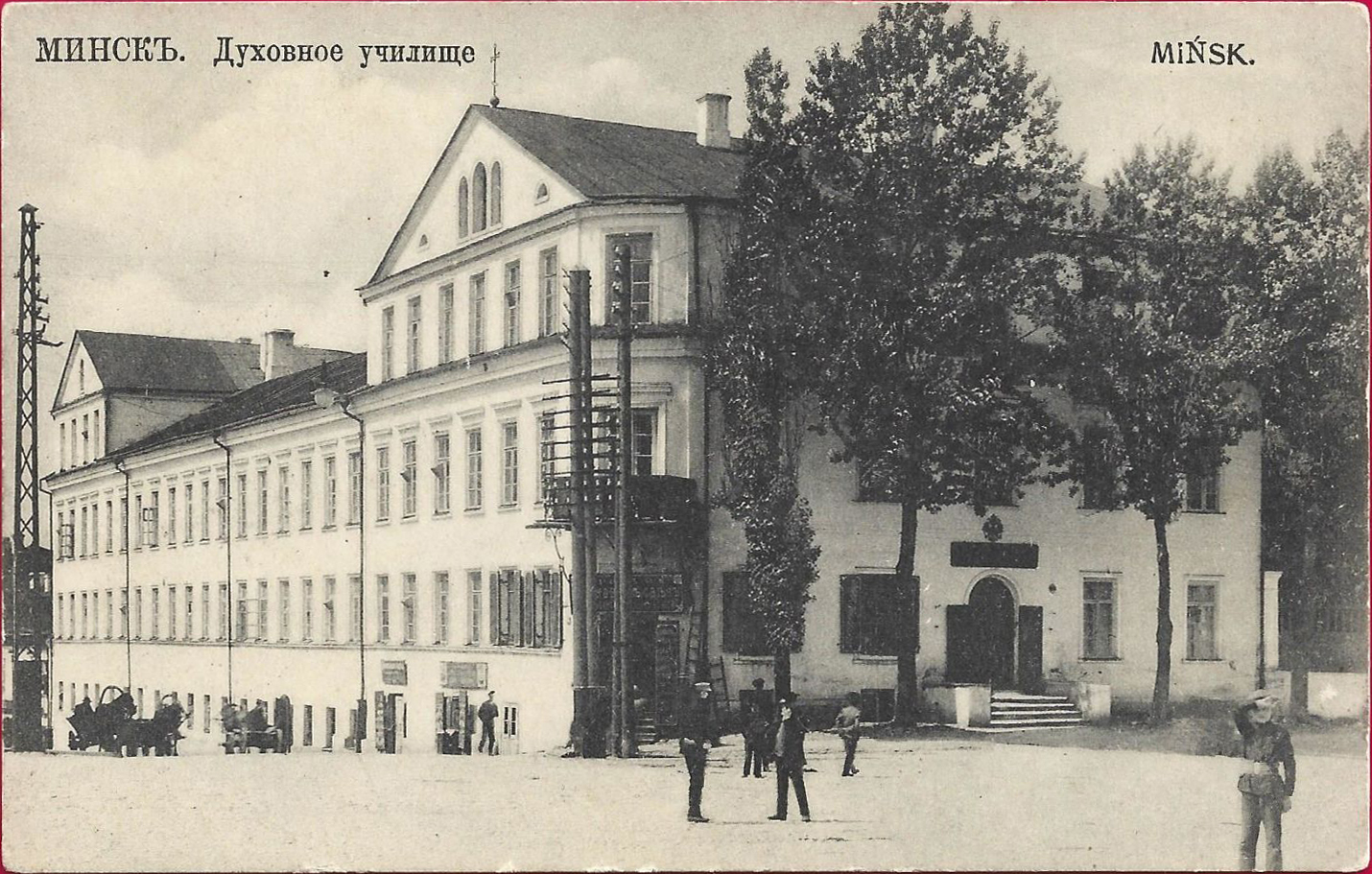 Беларуская (тарашкевіца): Менск (Miensk), рог пляцу Высокага Рынку (plac Vysoki Rynak) і вуліцы Койданаўскай (vulica Kojdanaŭskaja)